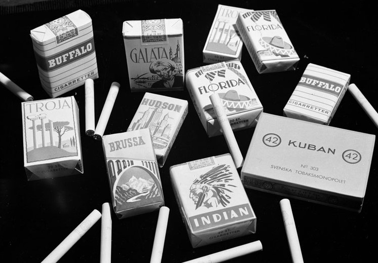 Tobaksmonopoletets produkter. Cigarettpaket